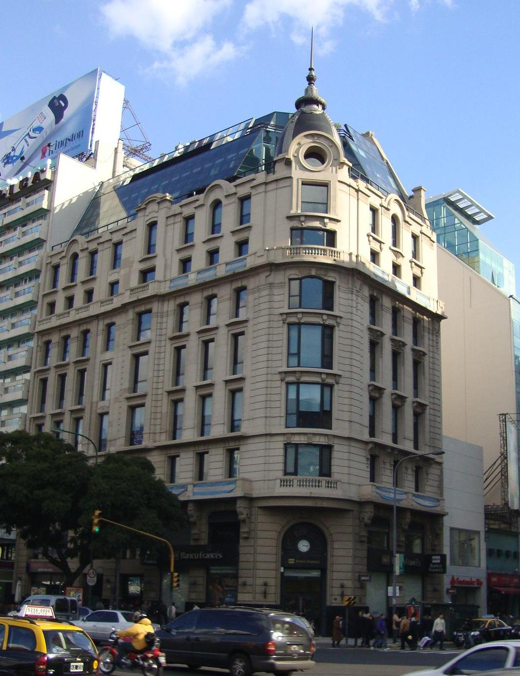 Edificio propiedad del Nuevo Banco Italiano. Actual sucursal del BBVA Banco Francés. Avenida Corrientes y Cerrito, Buenos Aires.